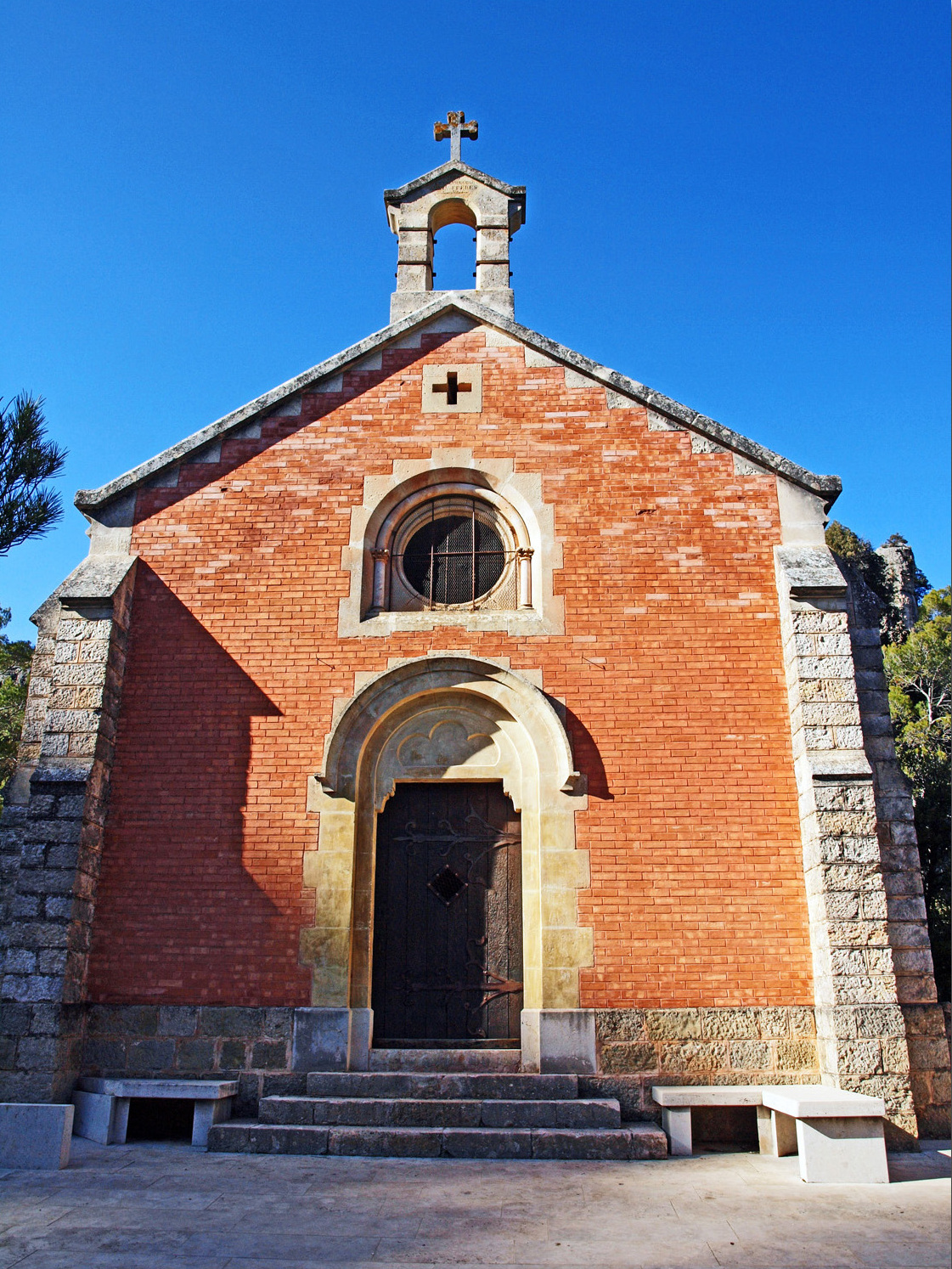 vue du parvis